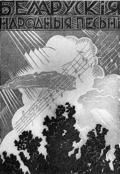 Першы песенны зборнік Рыгора Шырмы ў мастацкім афармленні Я. Горыда